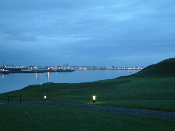 Reykjavik seen from Viðey Island Photo taken by user Aviad2001